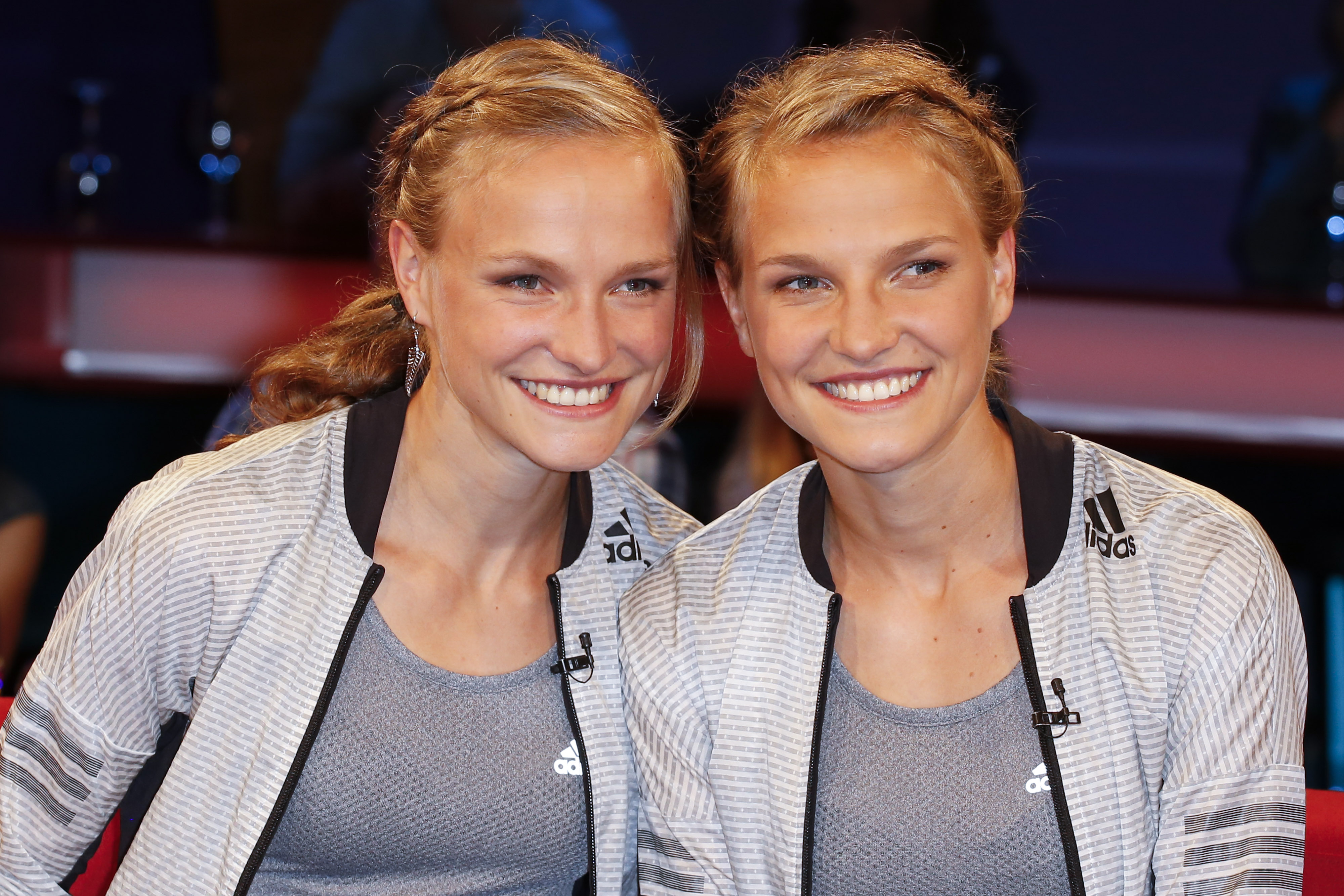 Anna und Lisa Hahner bei der NDR Talk Show am 03.06.2016 Foto; Jan-Timo Schaube